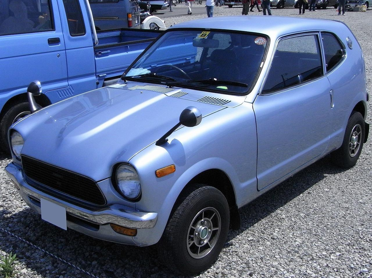 ホンダ・Z 中期SA型 前